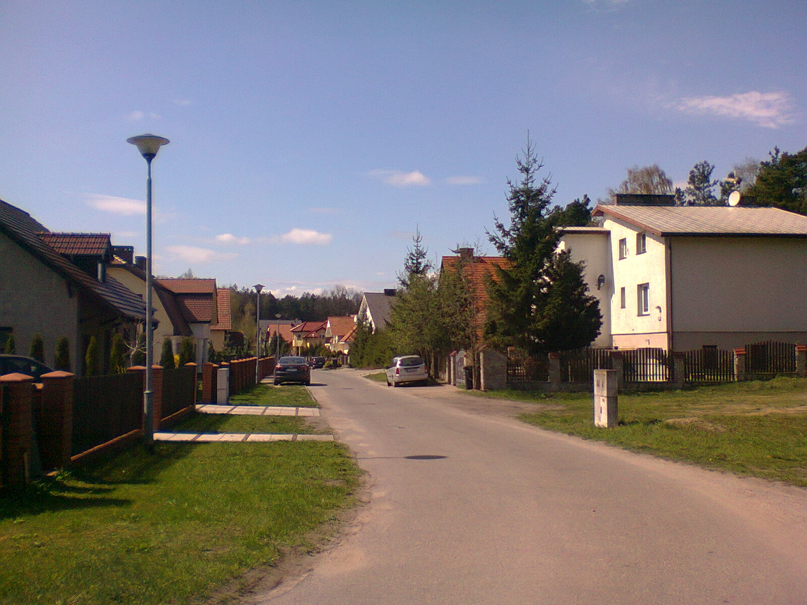 Marszów ul. Leśna